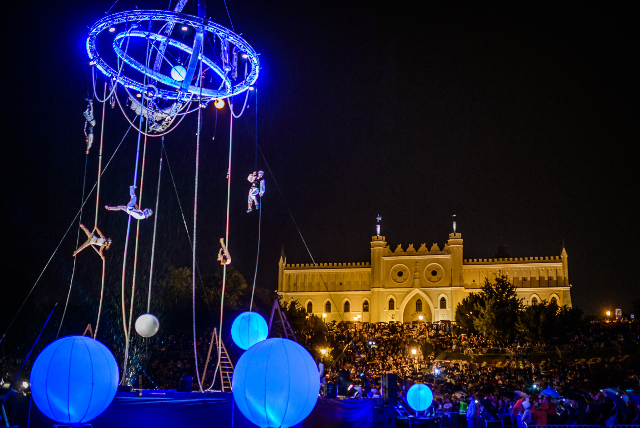 Deus Ex Machina „Galileo” podczas Karnawału Sztukmistrzów w 2017 roku na Placu Zamkowym